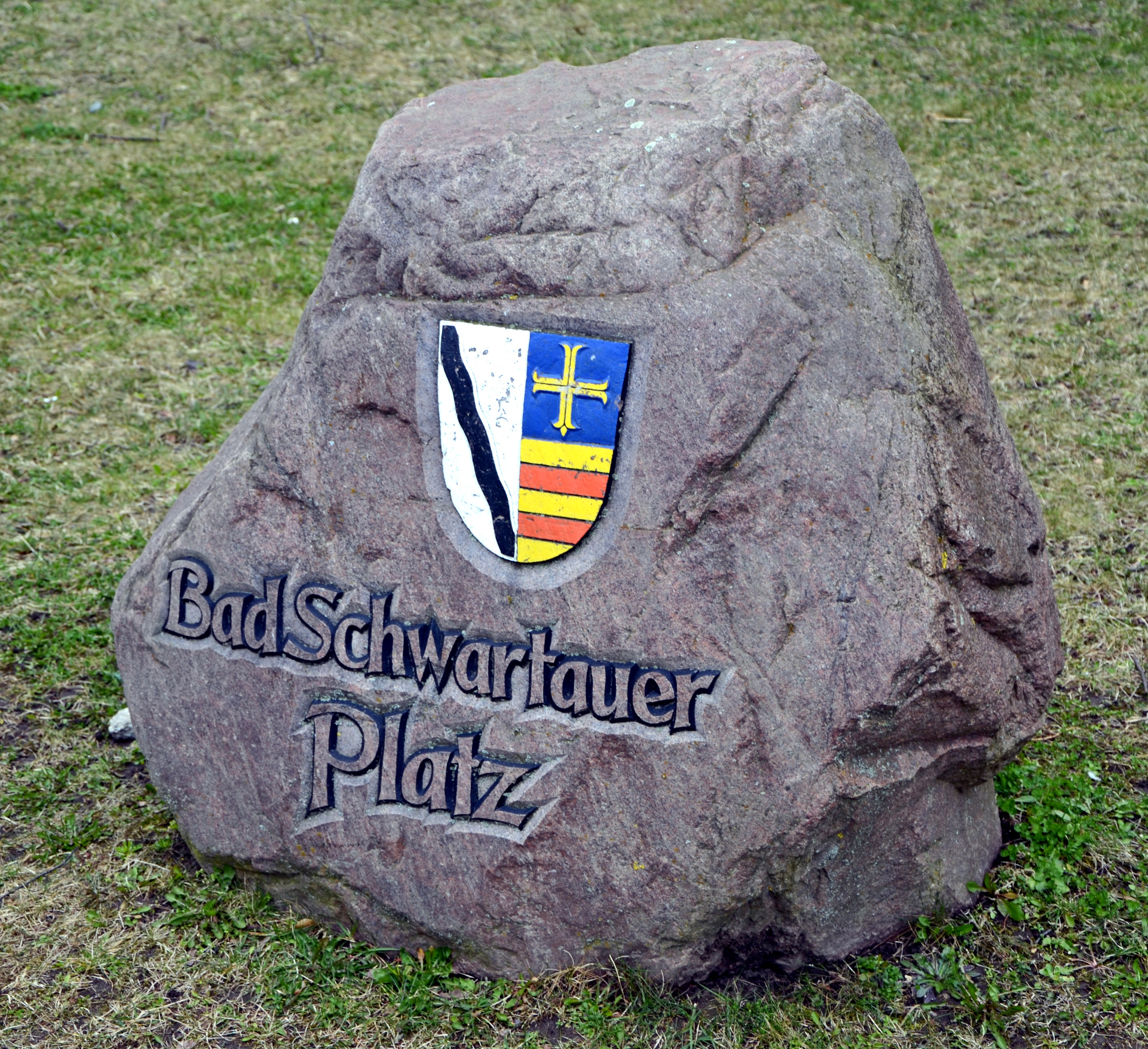 Findling mit der Beschriftung Bad Schwartauer Platz in Bad Doberan (beides sind Partnerstädte)